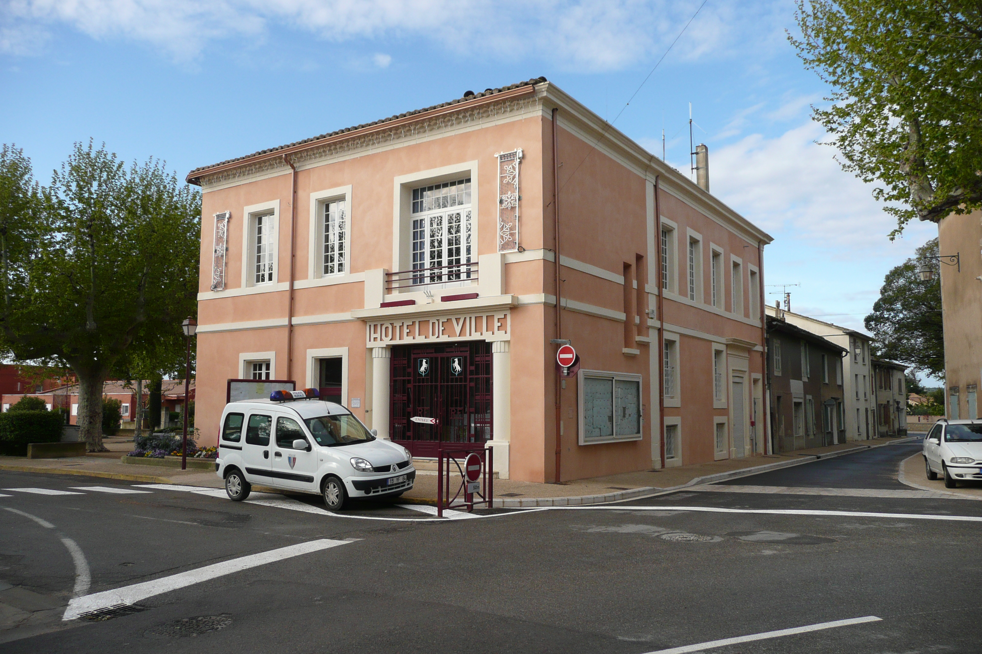 Hôtel de ville à Cheval-Blanc.